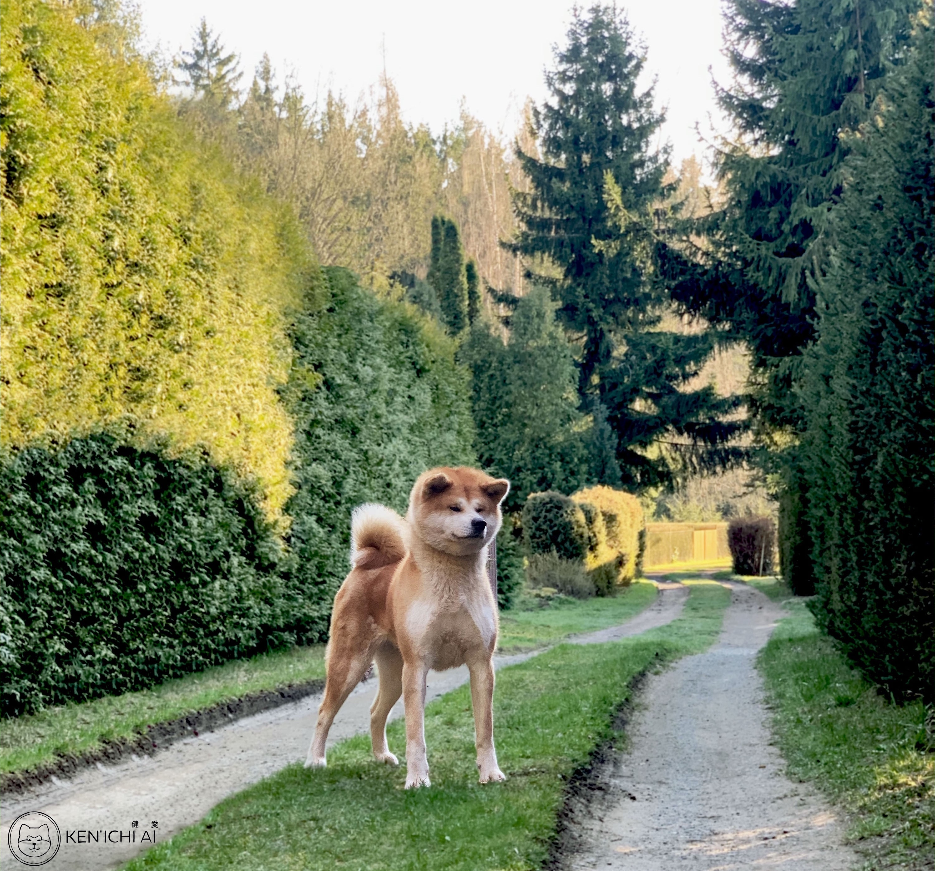 Akita, červená, fena, 3 roky